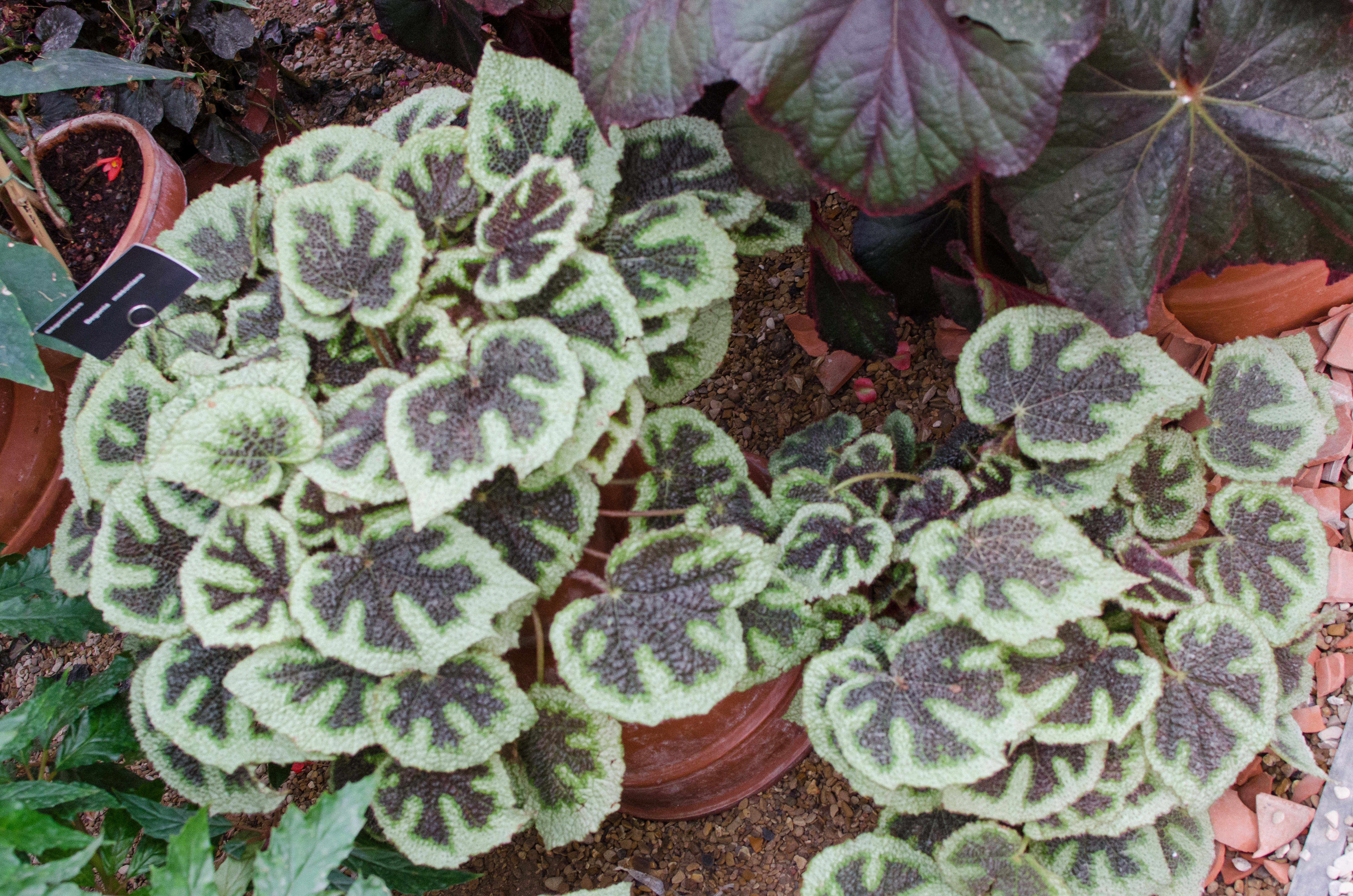 Begonia masoniana dans le cadre de l'exposition "Bougainville et les explorateurs" à l'Orangerie des Jardins du Luxembourg